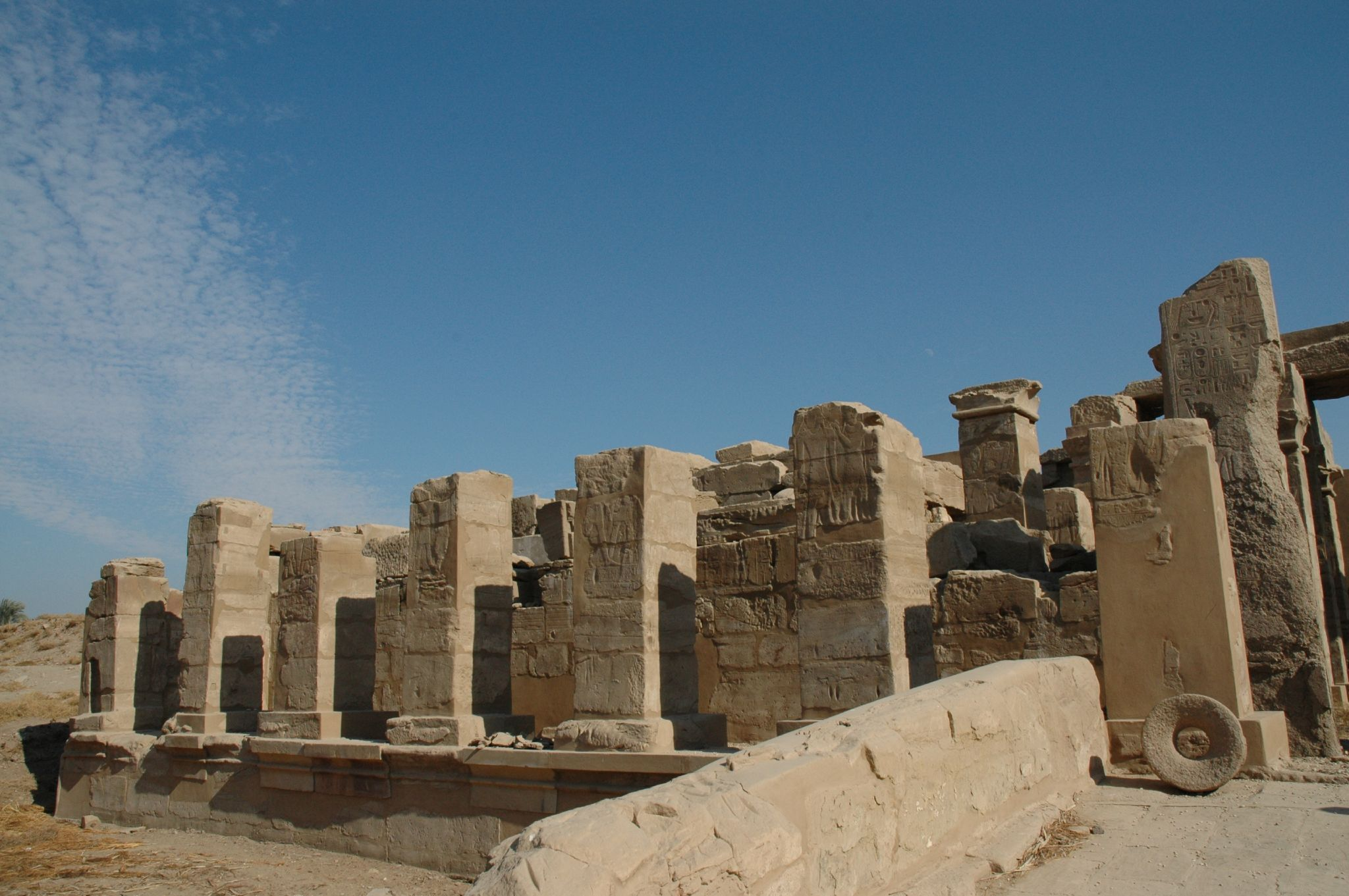 Tempio di Karnak: ruderi